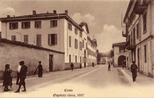 Ospedale Sant'Anna di Como, 1907, attuale sede del Conservatorio di Como.